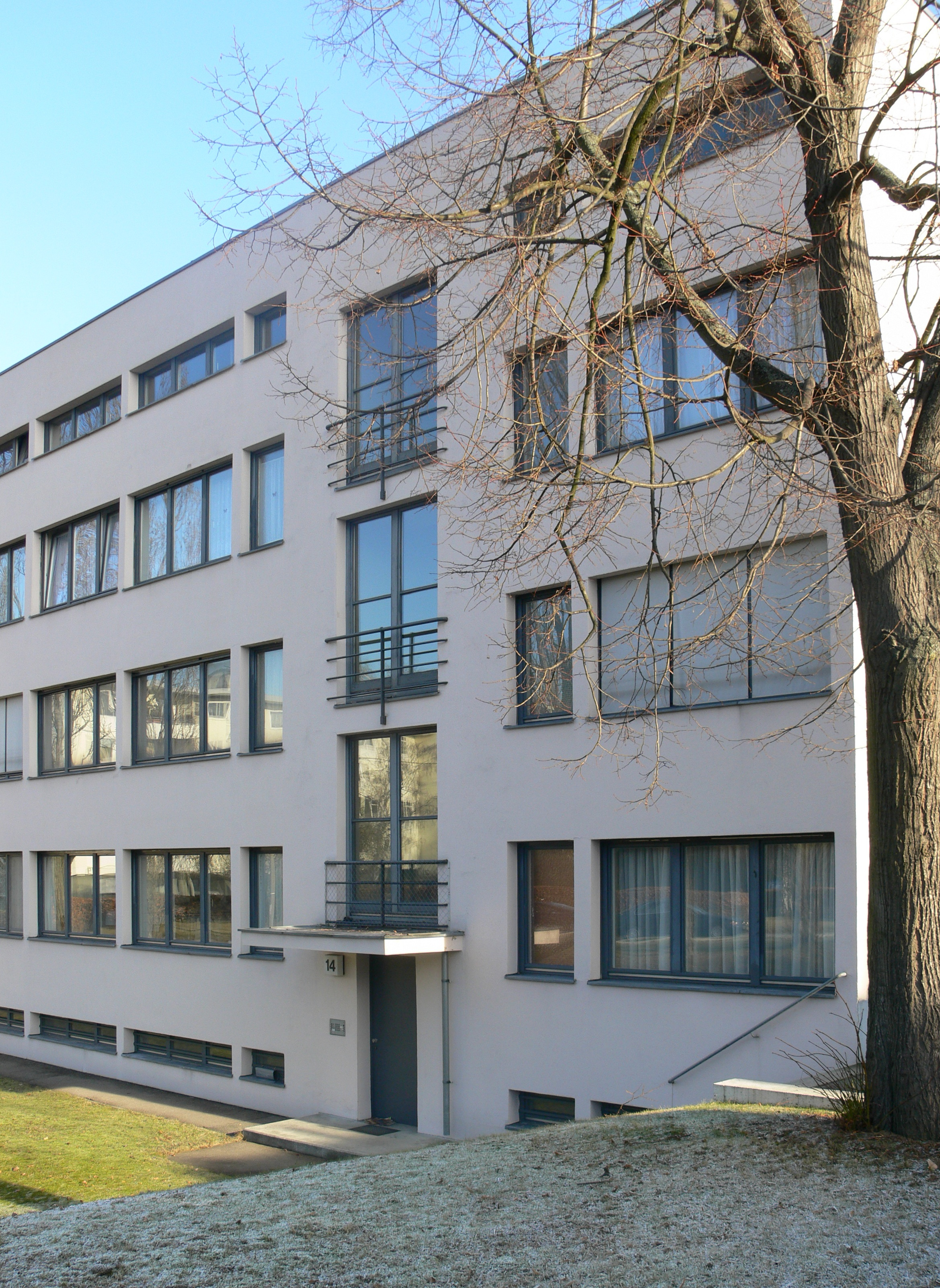 Stuttgart, Weißenhofsiedlung, Haus Am Weißenhof 14-20 von Lufdwig Mies van der Rohe